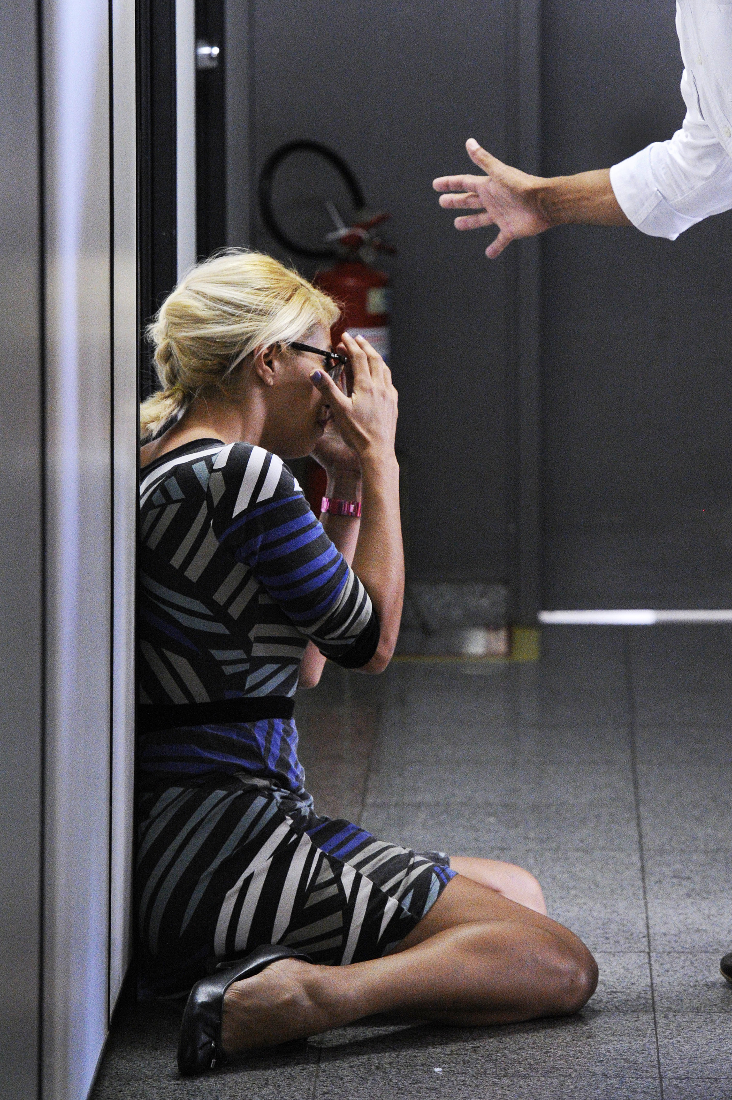 Como parte das celebrações dos dez anos da Lei Maria da Penha, será feita a apresentação do Observatório da Mulher contra a Violência e o lançamento de seu Portal de informações. O Portal do Observatório da Mulher contra a Violência será uma das ferramentas a dar visibilidade e a permitir tanto o cruzamentos dos dados oficiais sobre violência contra a mulher como a troca de conhecimento entre público em geral e instituições envolvidas no combate a esse tipo de violência. Foto: Edilson Rodrigues/AgÃªncia Senado